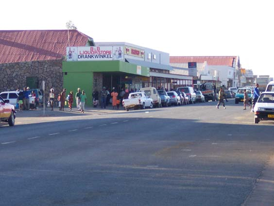 Haupteinkaufsstraße in Mariental, Namibia